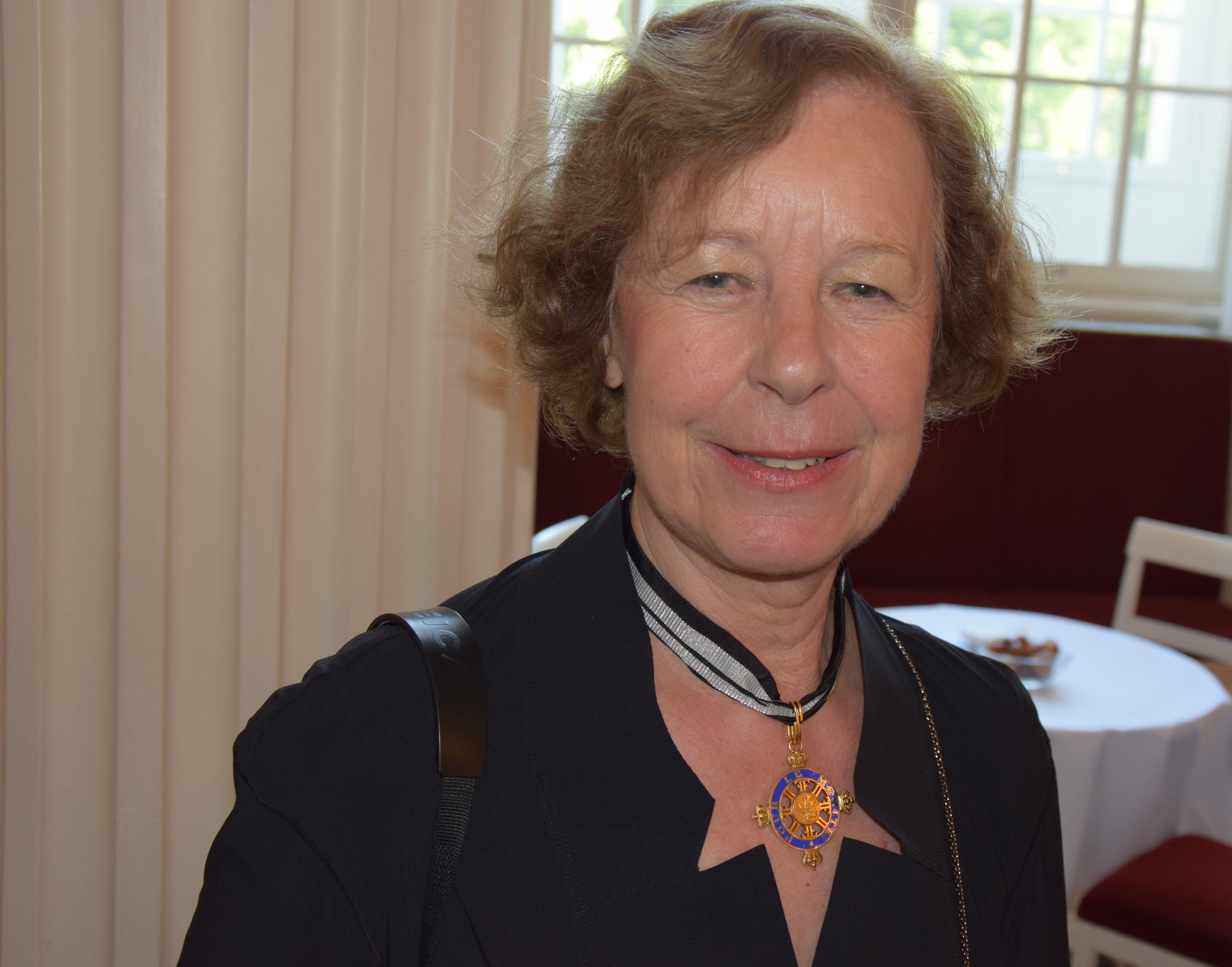 Öffentliche Sitzung der Mitglieder des Ordens Pour le mérite für Wissenschaften und Künste 2014 im Konzerthaus am Gendarmenmarkt in Berlin